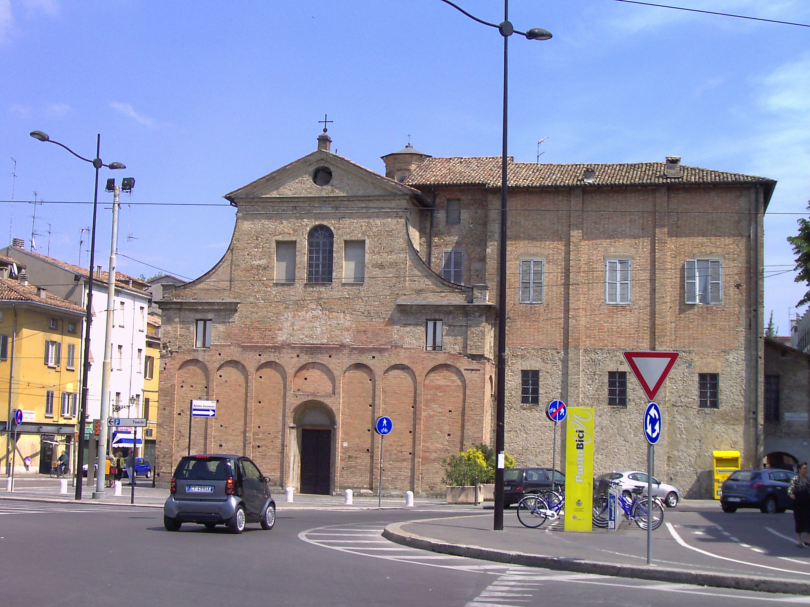 Chiesa di Santa Croce, Parma